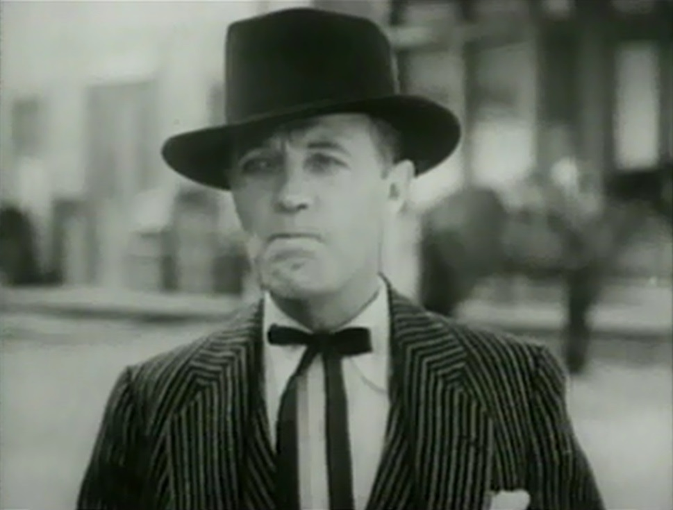 El actor estadounidense Forrest Taylor en una escena de la película Jinetes del destino.